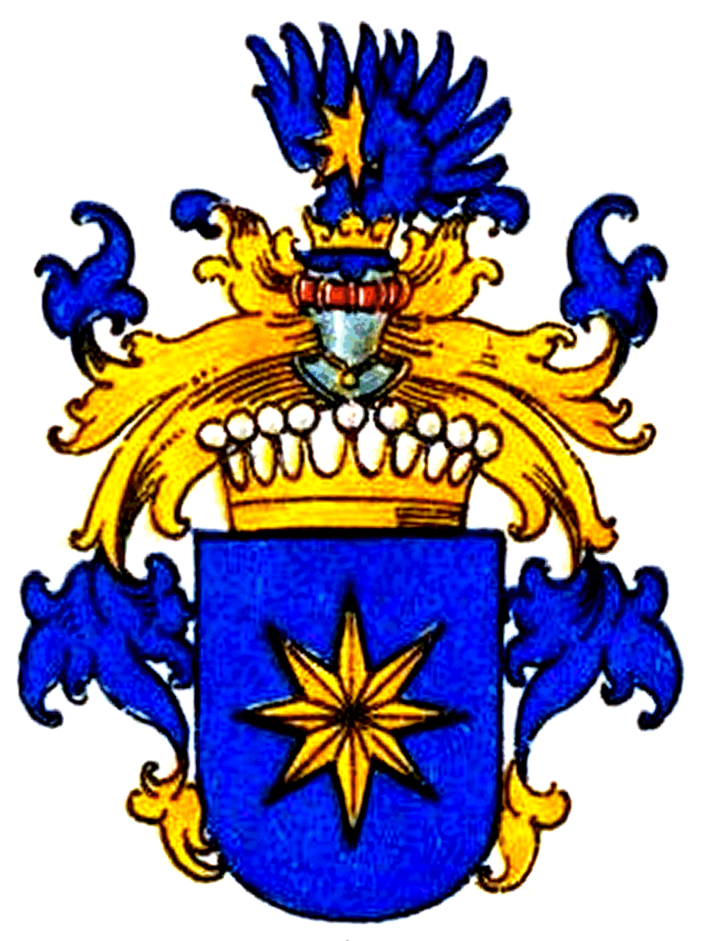 Wappen derer von Sternberg